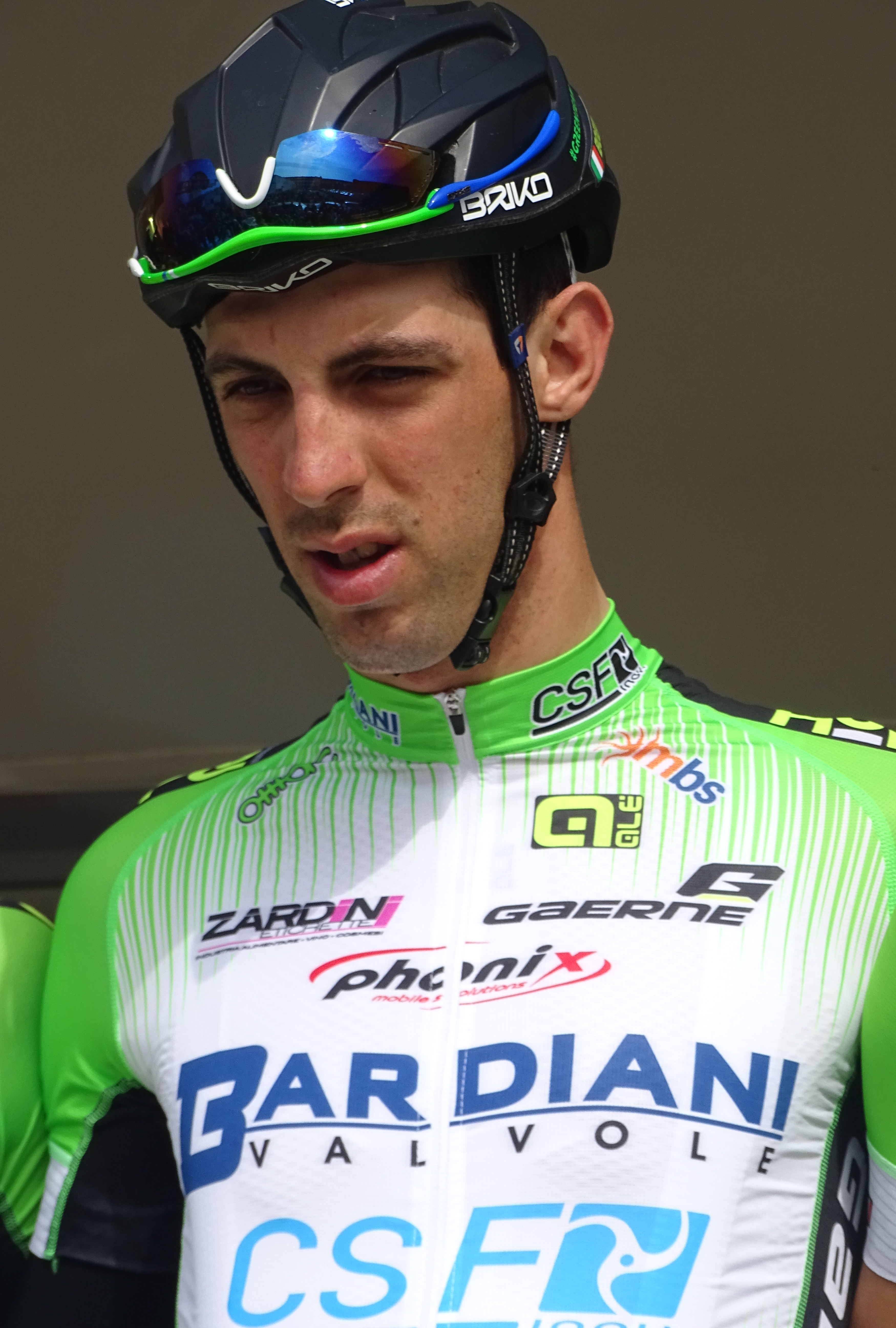 Reportage réalisé le jeudi 16 avril à l'occasion du départ et de l'arrivée du Grand Prix de Denain 2015 à Denain, Nord, Nord-Pas-de-Calais, France.